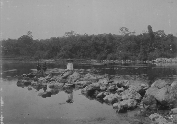 Foto. Het kratermeer Rantja-Boengoer.